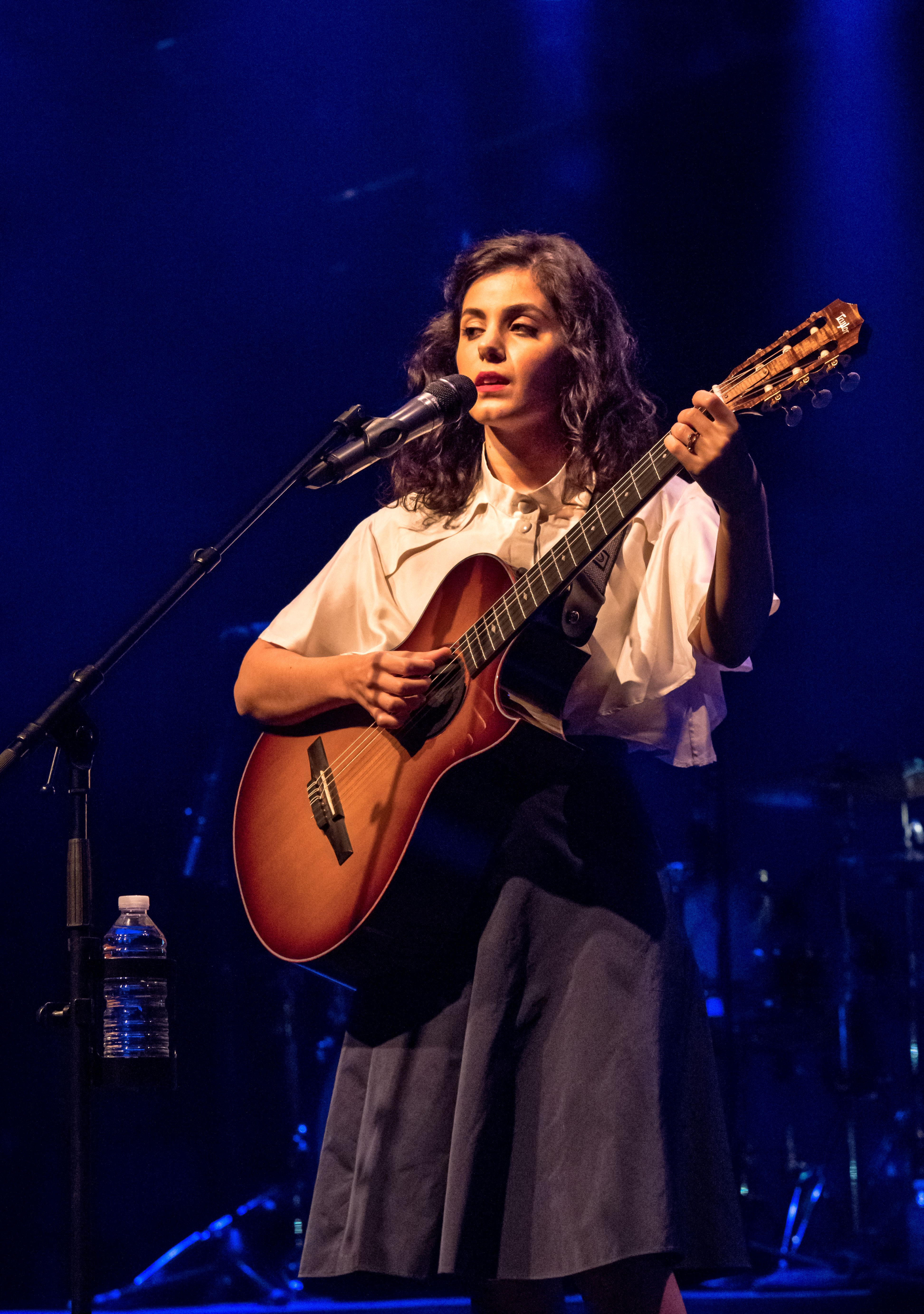 Bilder vom Zelt Musik Festival 2016 in Freiburg im Breisgau Katie Melua